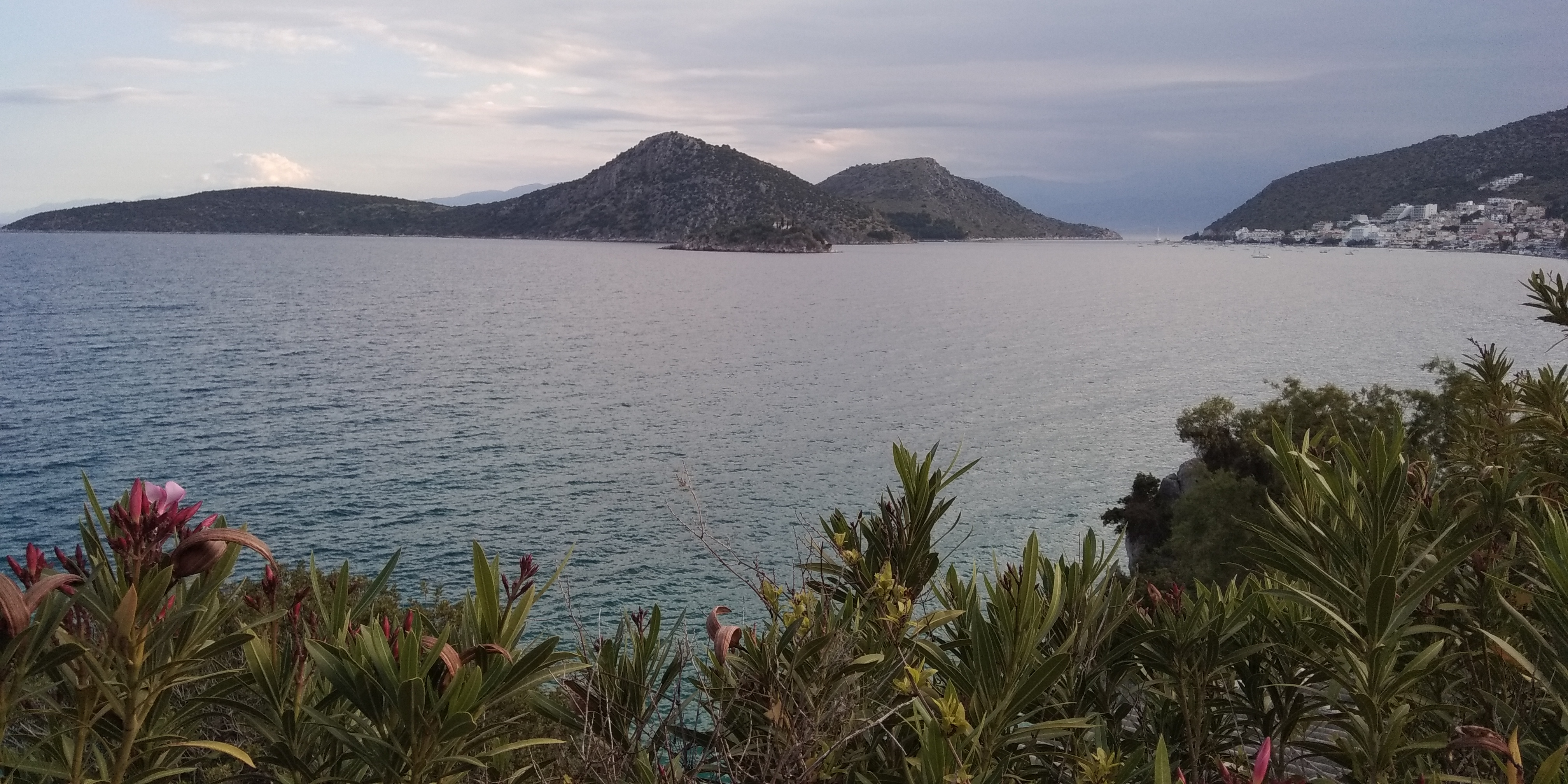 Golfe de Tolo et Romvi island, Nauplie, Grèce